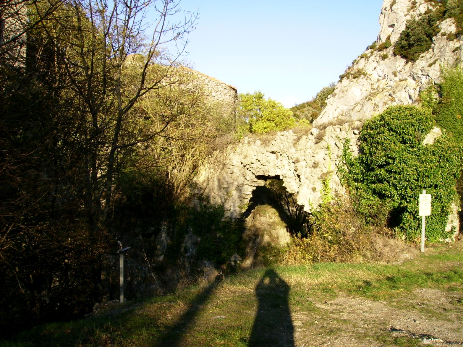 Laroque-de-Fa (France) - Pont de Ture (1)